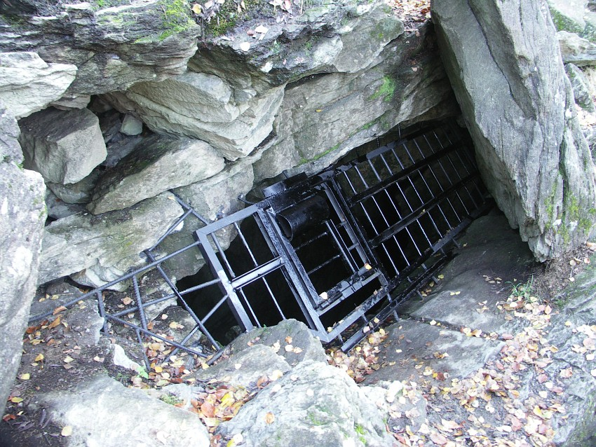 Ledová jeskyně Naděje (Eishöhle Hoffnung), Lusatian Mountains, Czech Republic